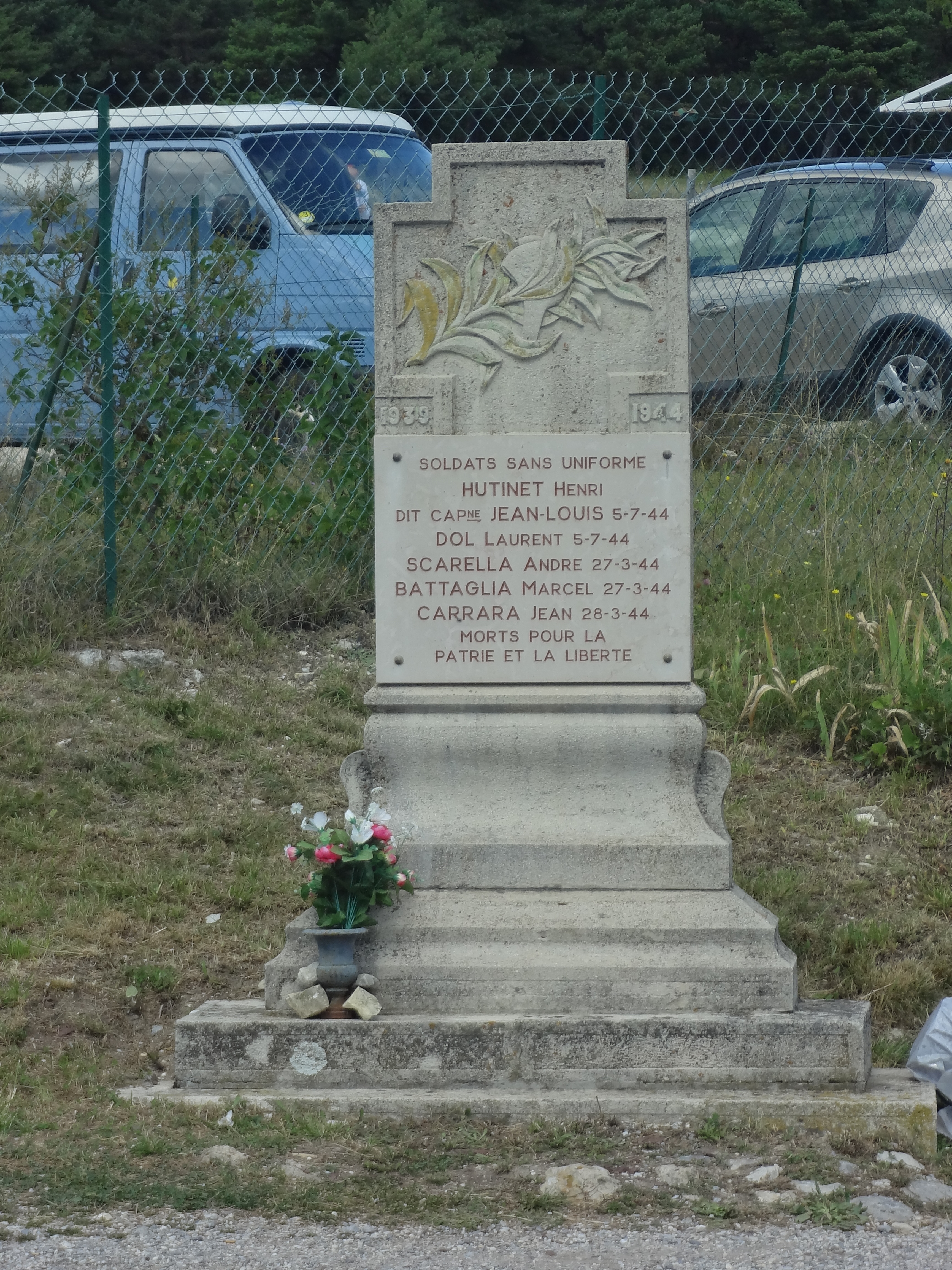 Stèle FTPF en hommage à Hutinet, dit Jean-Louis, dit Voray, chef FTP de secteur, abattu lors d'une liaison en moto par un convoi allemand arrivant en sens inverse